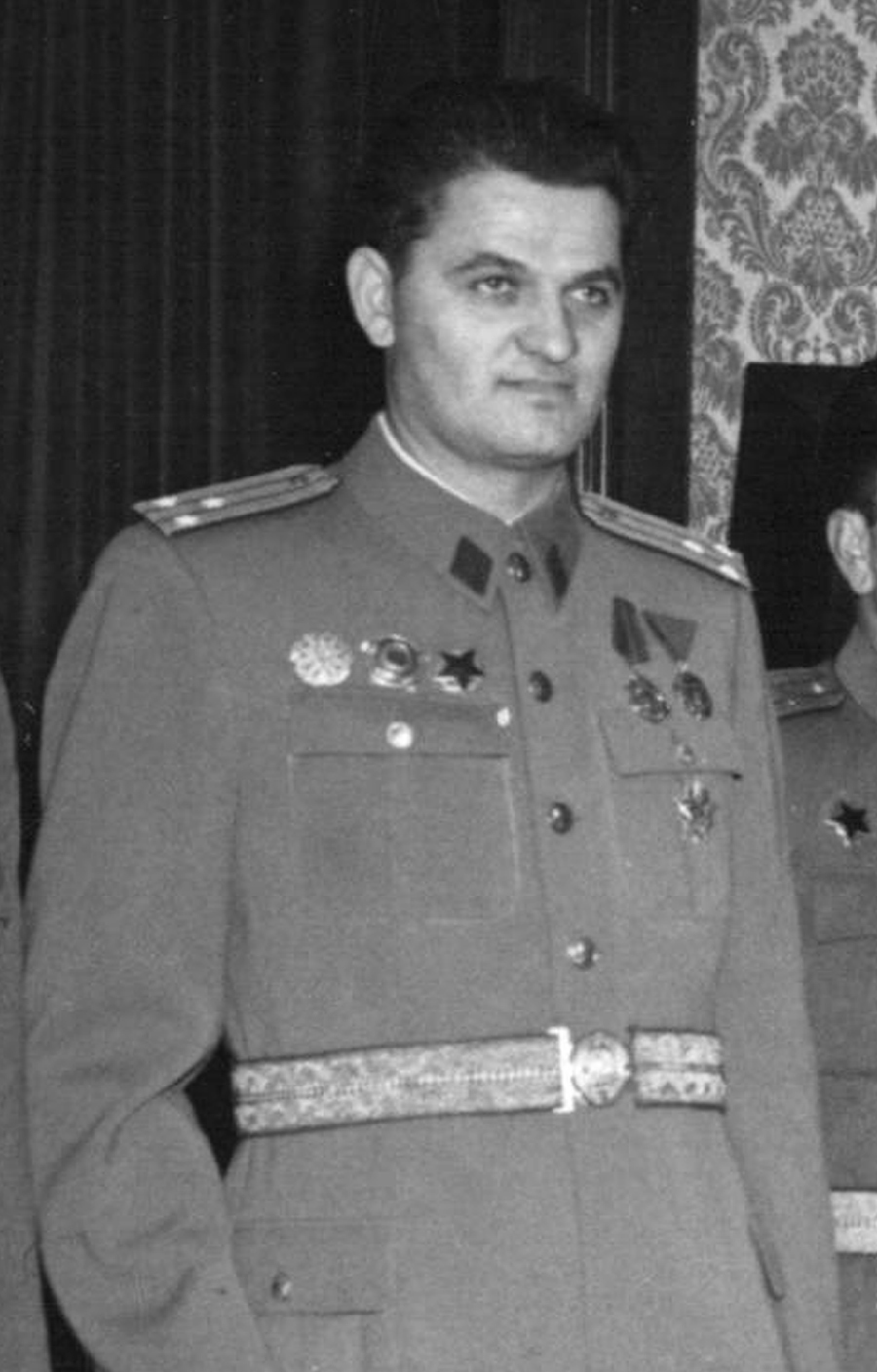 Srpski (latinica): Đurađ Predojević, narodni heroj Jugoslavije